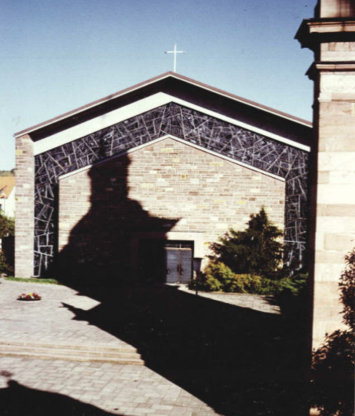 Kirche St. Peter und Paul Außenansicht Kirchplatz